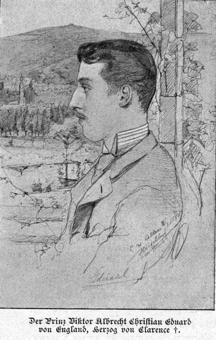 Porträt von Albert Victor, Duke of Clarence and Avondale